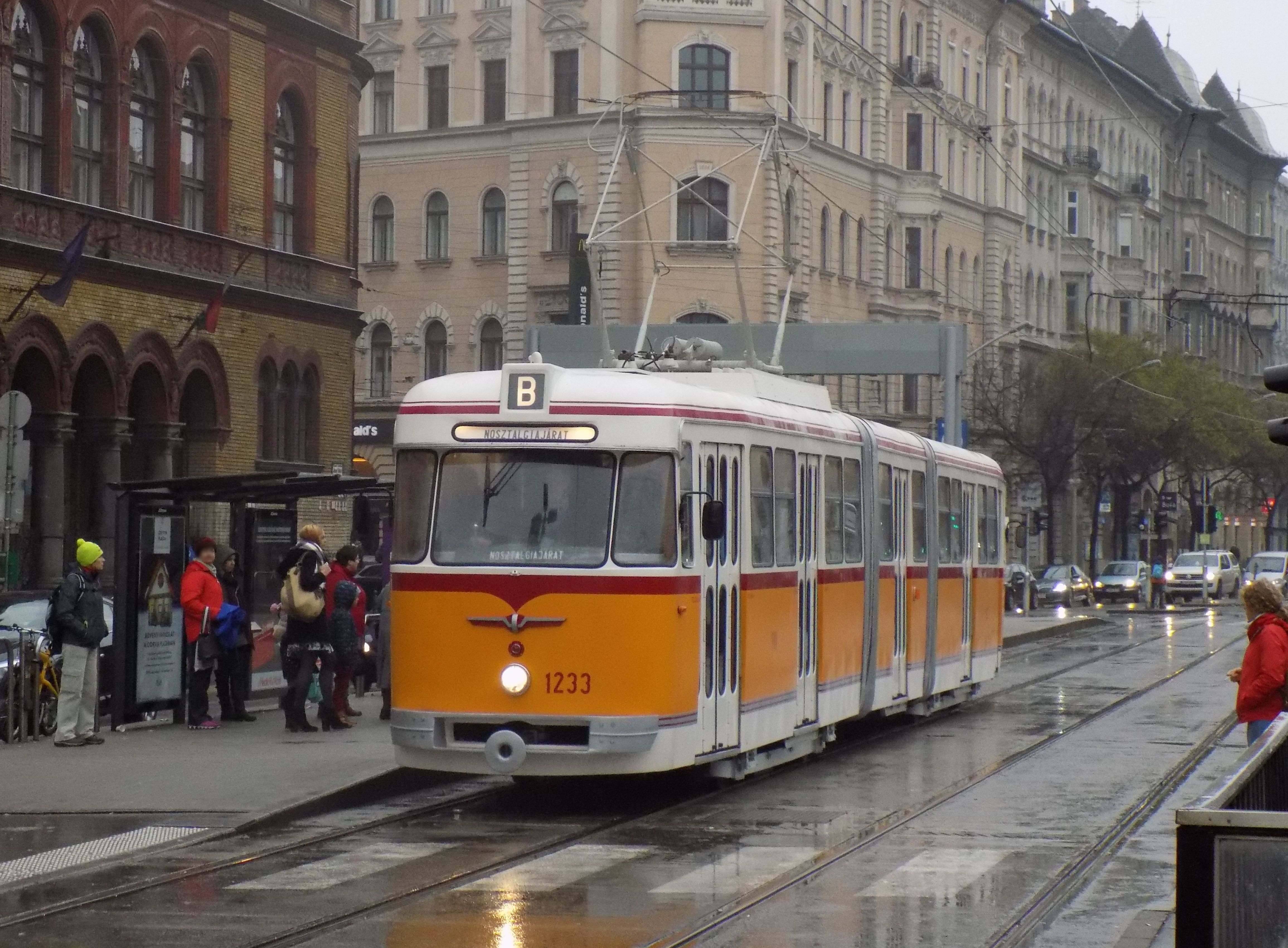 FVV CSM–4 típusú (Bengáli) nosztalgiavillamos a Blaha Lujza téren (psz. 1233)